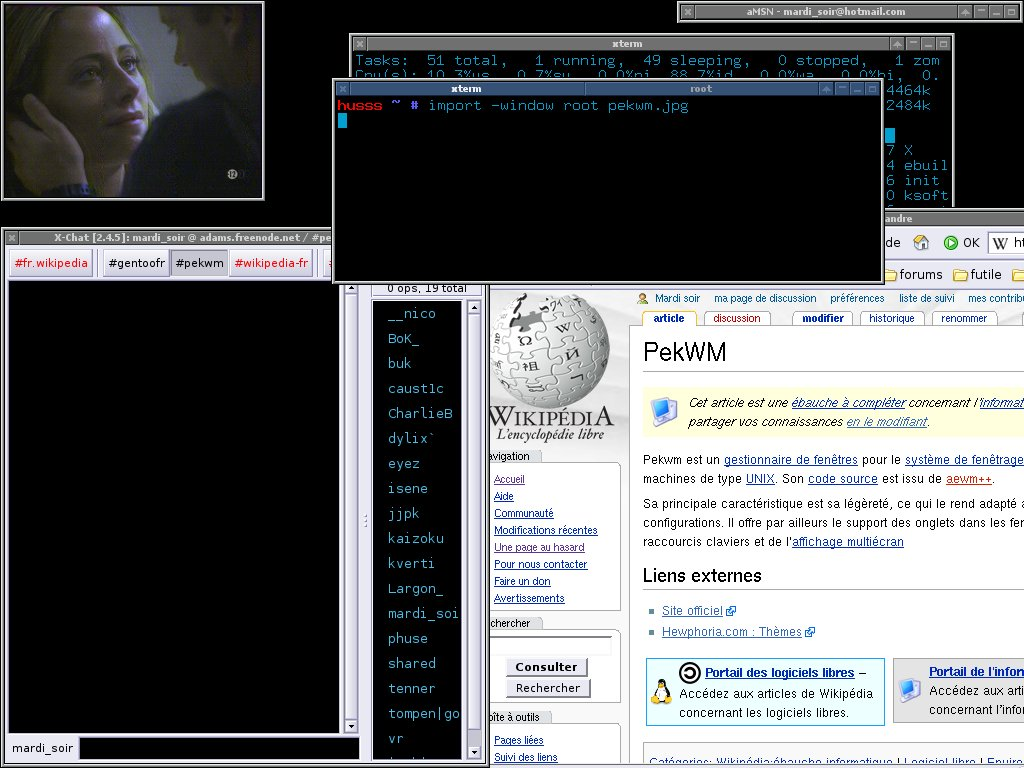 Une capture d'écran rendant compte de l'aspect de pekwm Screenshot of pekwm